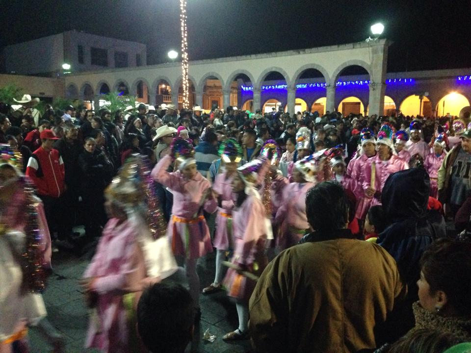 Danzas de la Fiesta del Paseo de carros 25 de Diciembre en Uriangato, Gto.